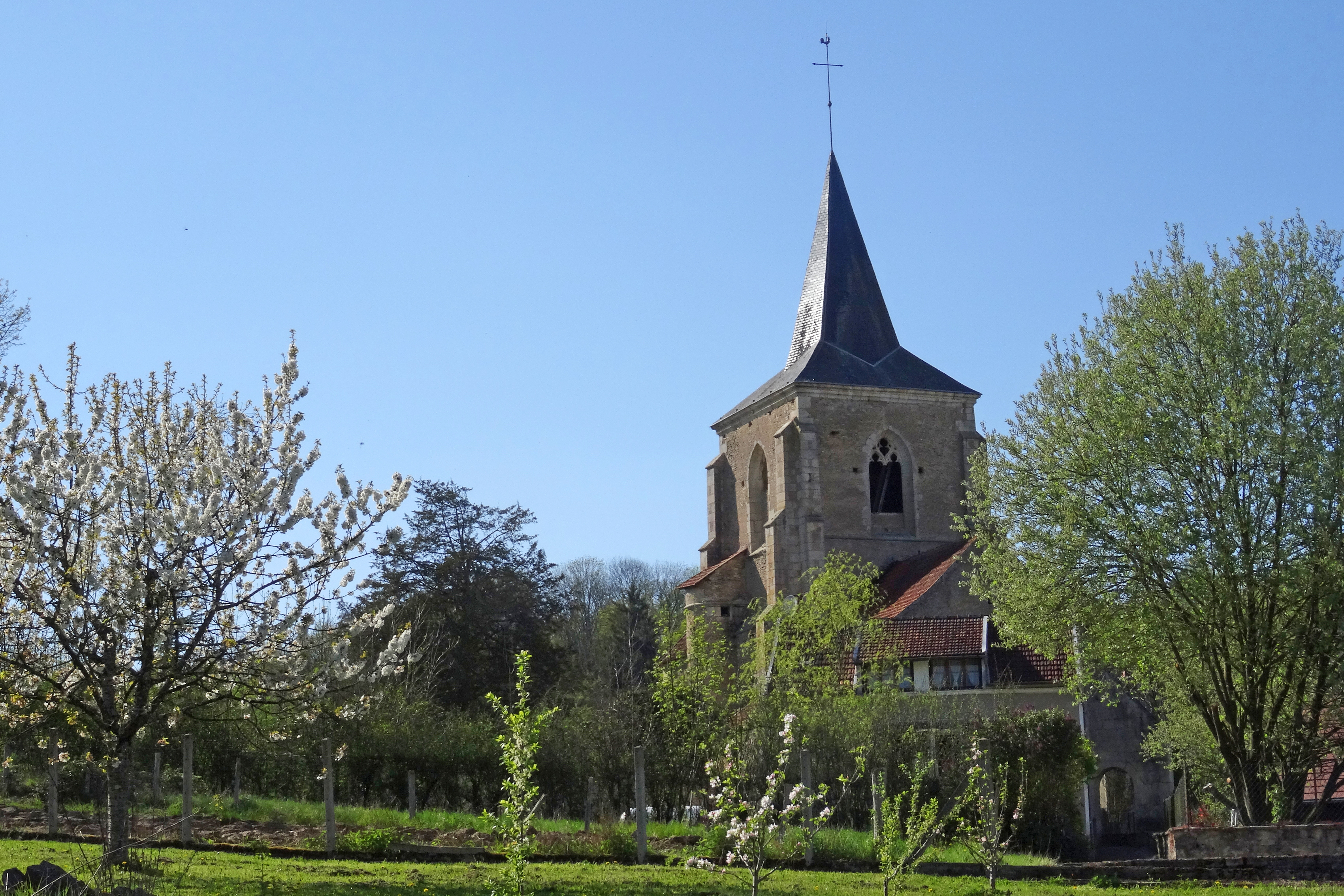 L'église de Dissangis (Yonne)